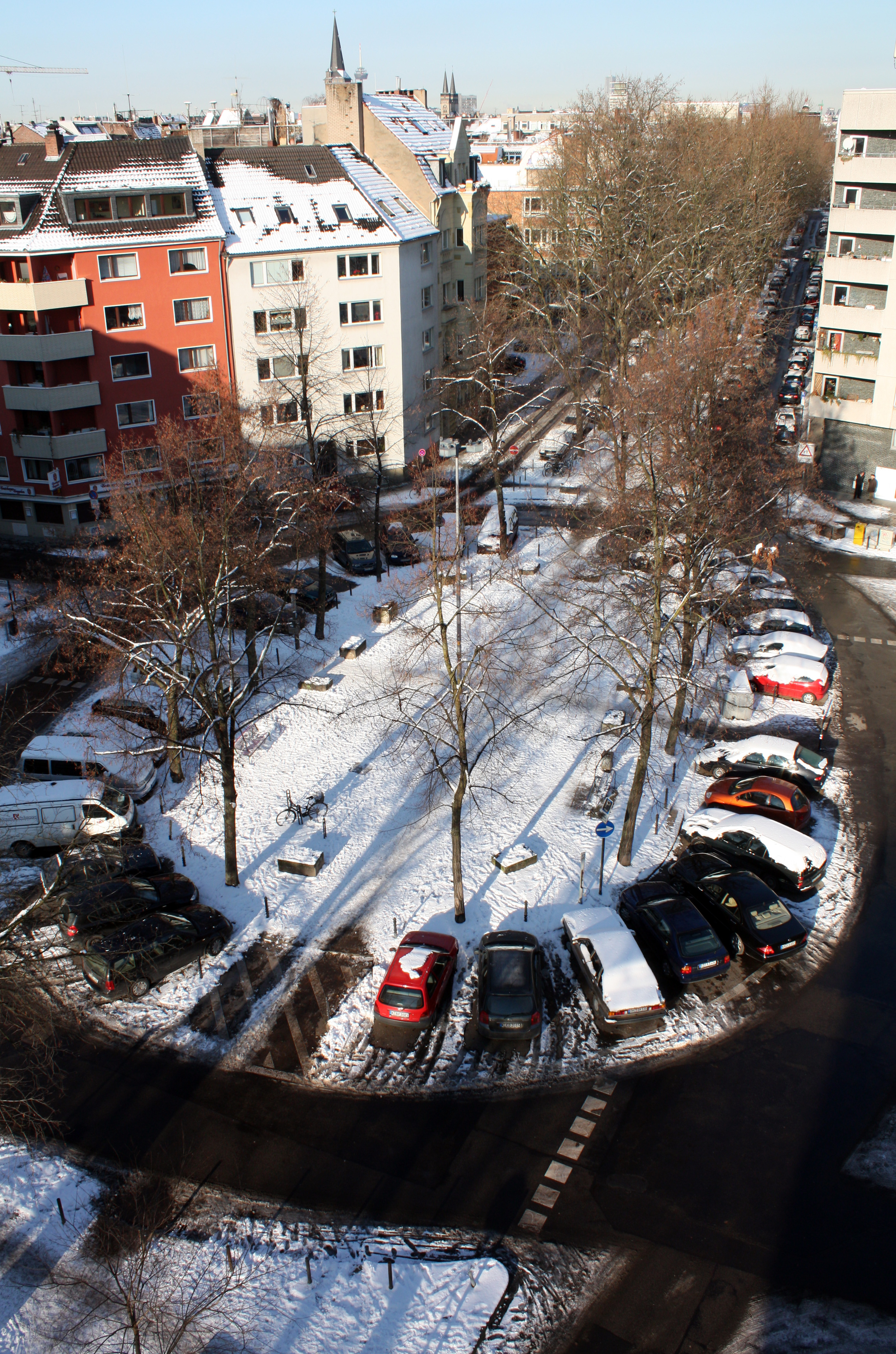 "Eierplätzchen", Köln-Südstadt